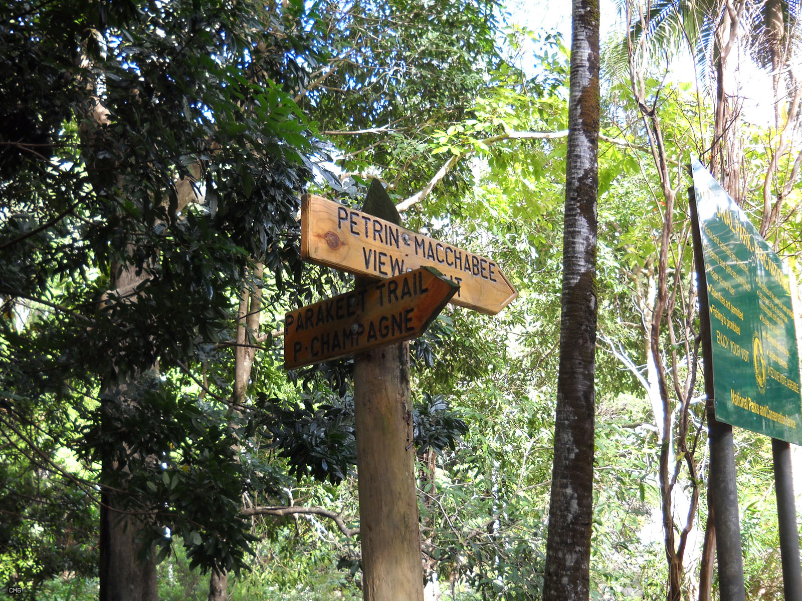 Parakeet Trail